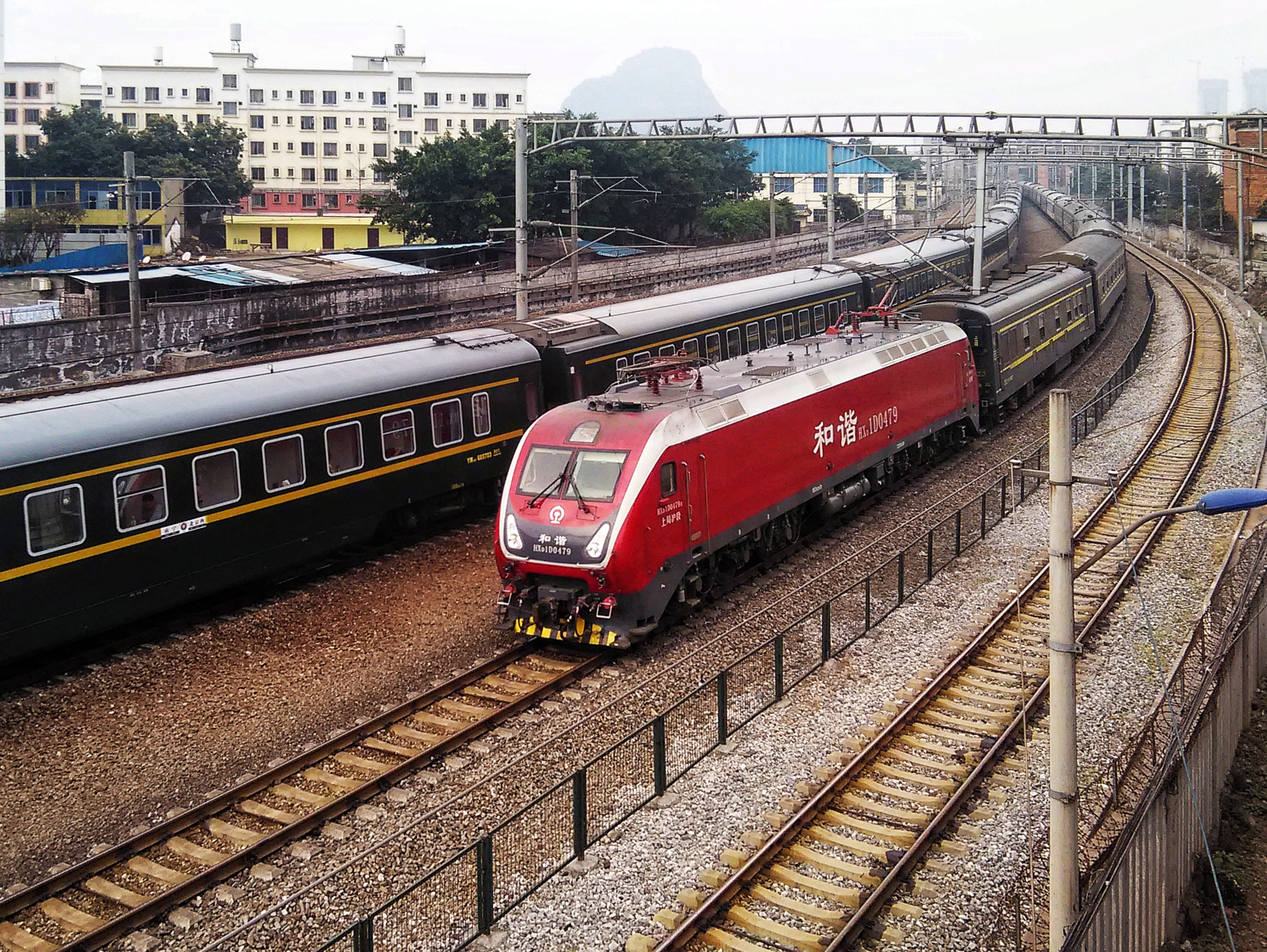 运行于柳南城际铁路的T25次列车